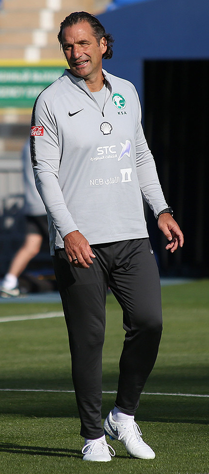 Сборная Саудовской Аравии потренировалась в Петербурге